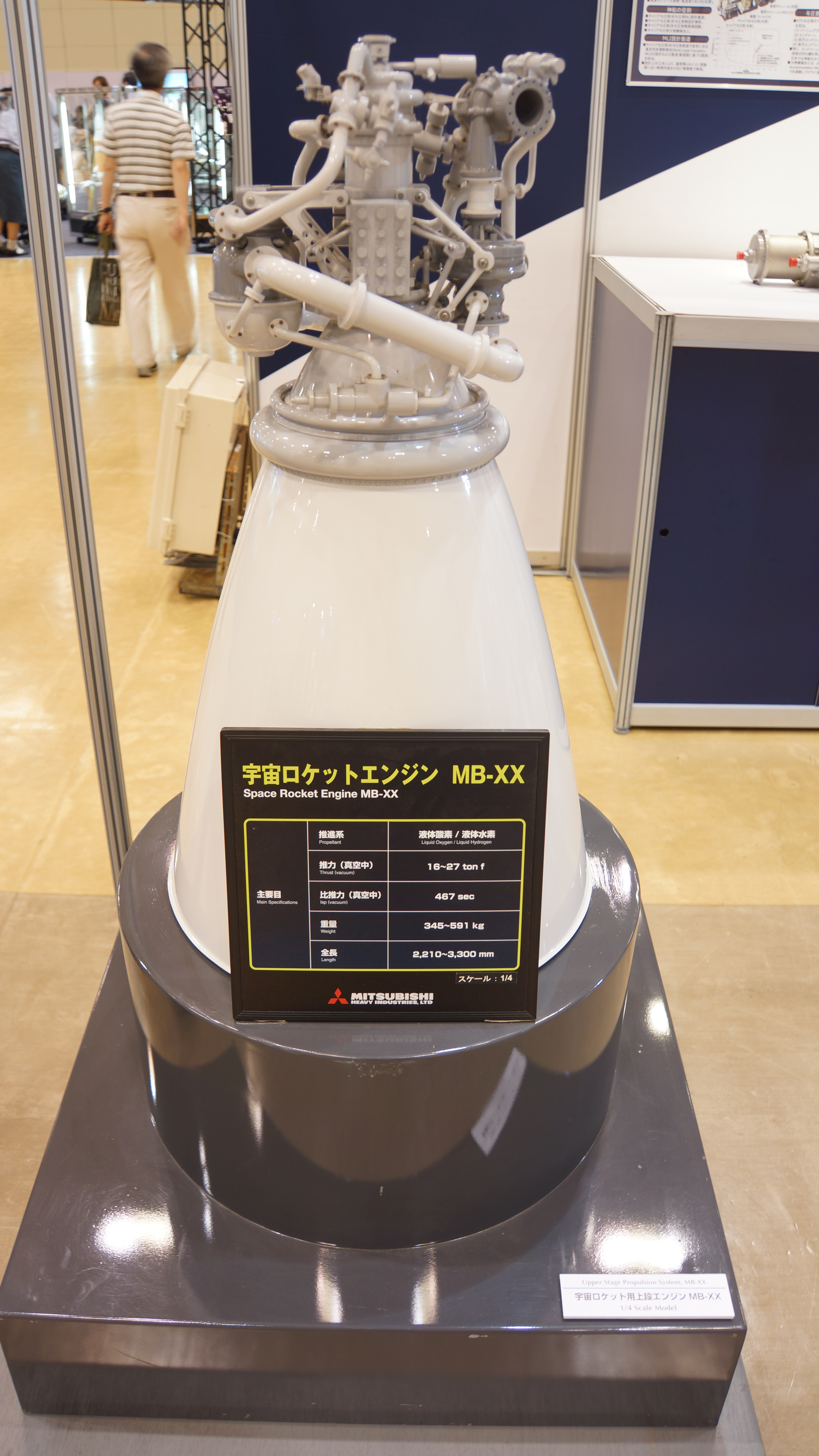 宇宙ロケットエンジンMB-XX（1/4スケール）。 15年7月4日 神戸国際会議場でのHYOGO-KOBE 宇宙博にて。